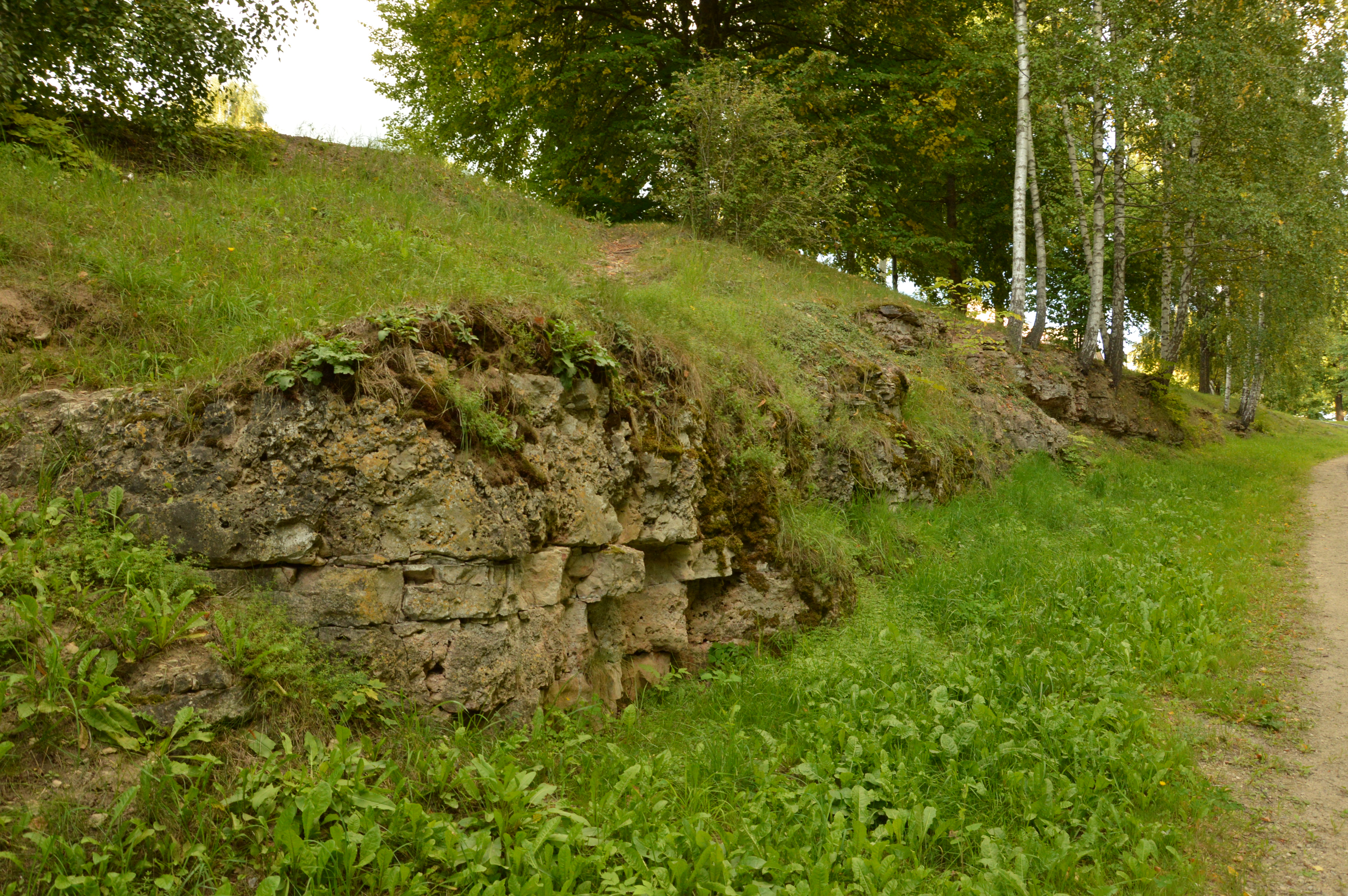 Paljanduv Koivalinna dolomiit